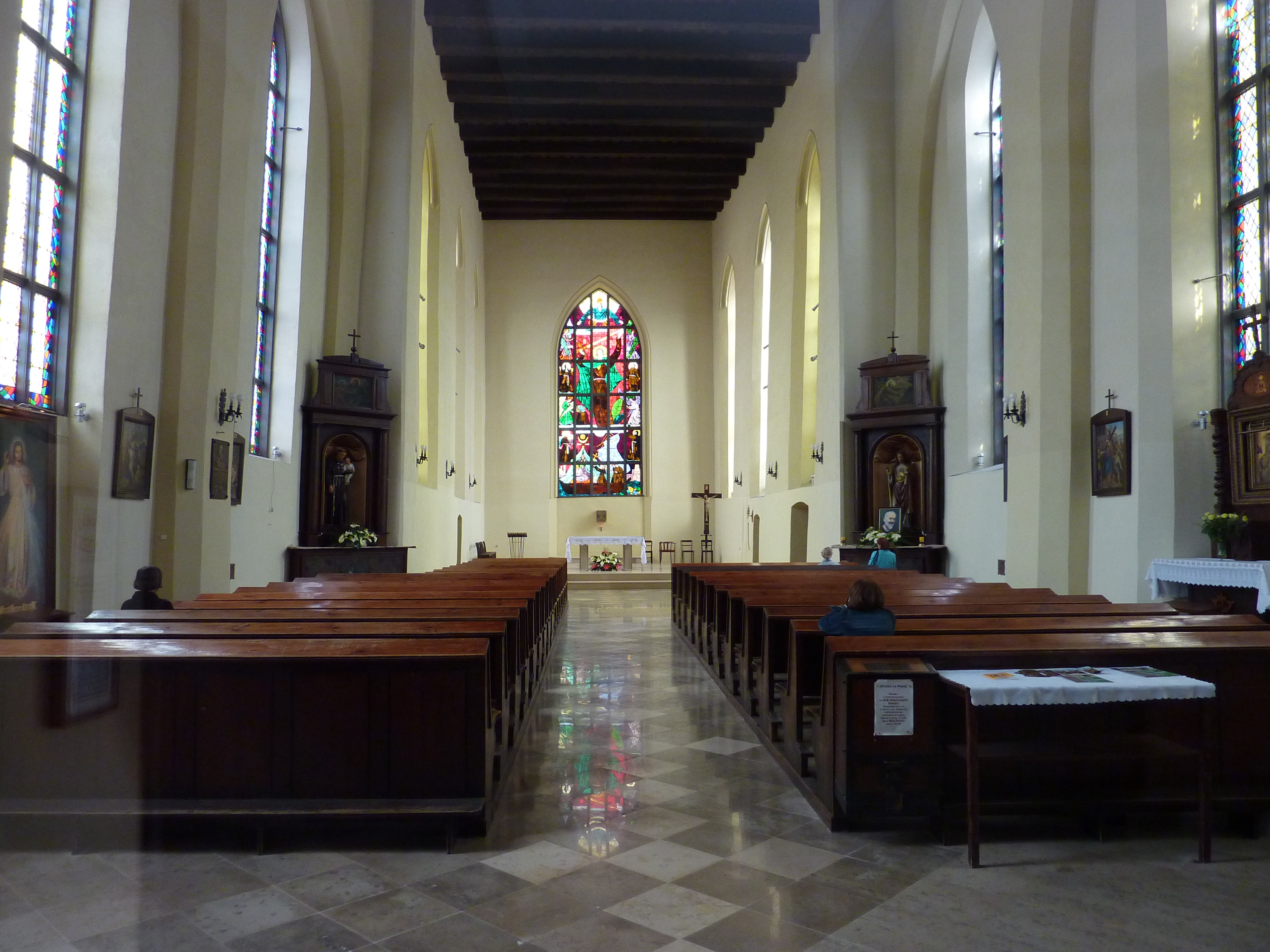 Gdańsk. Wnętrze kościoła św. Jakuba.